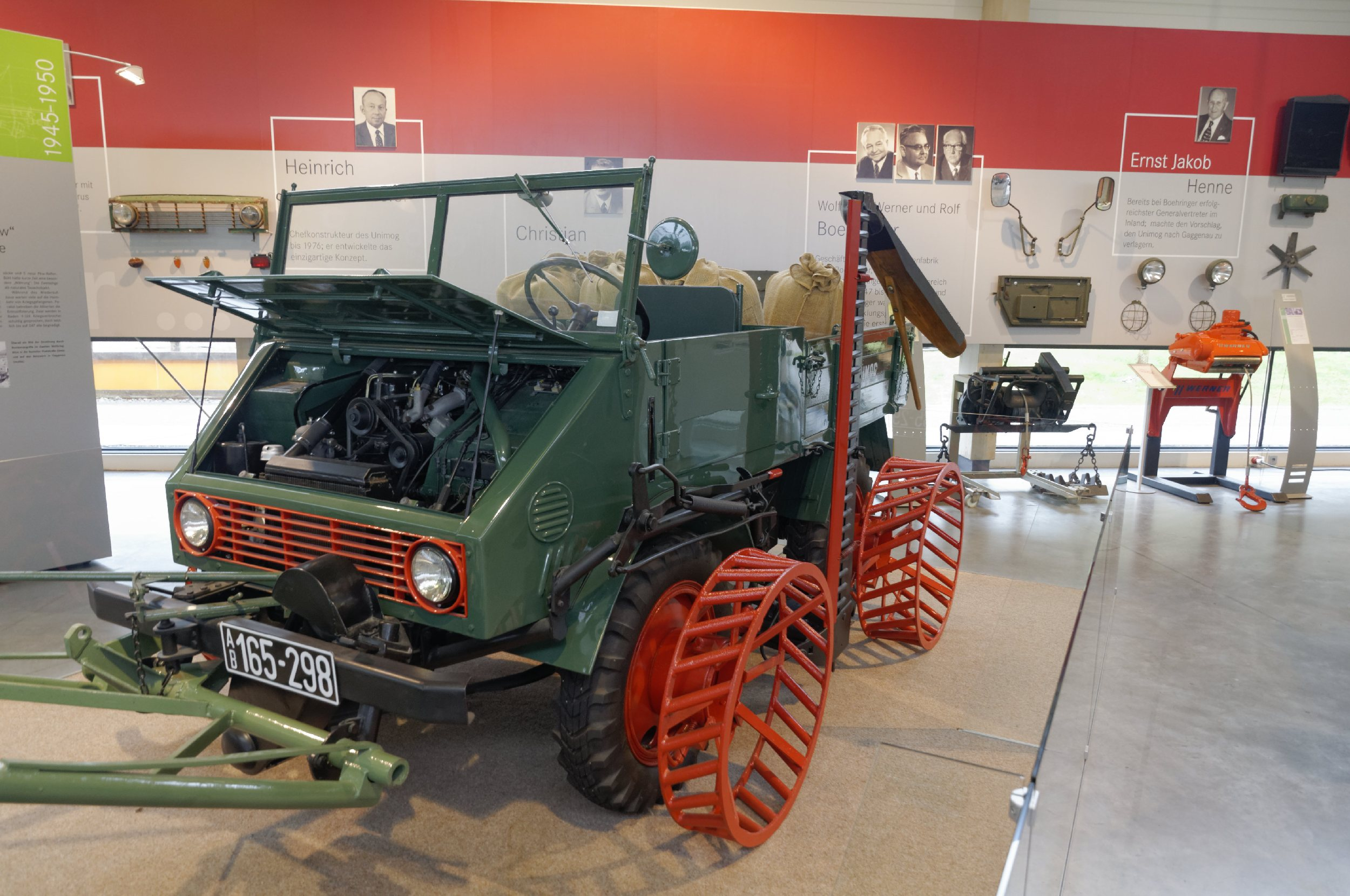 Gaggenau -Unimog-Museum